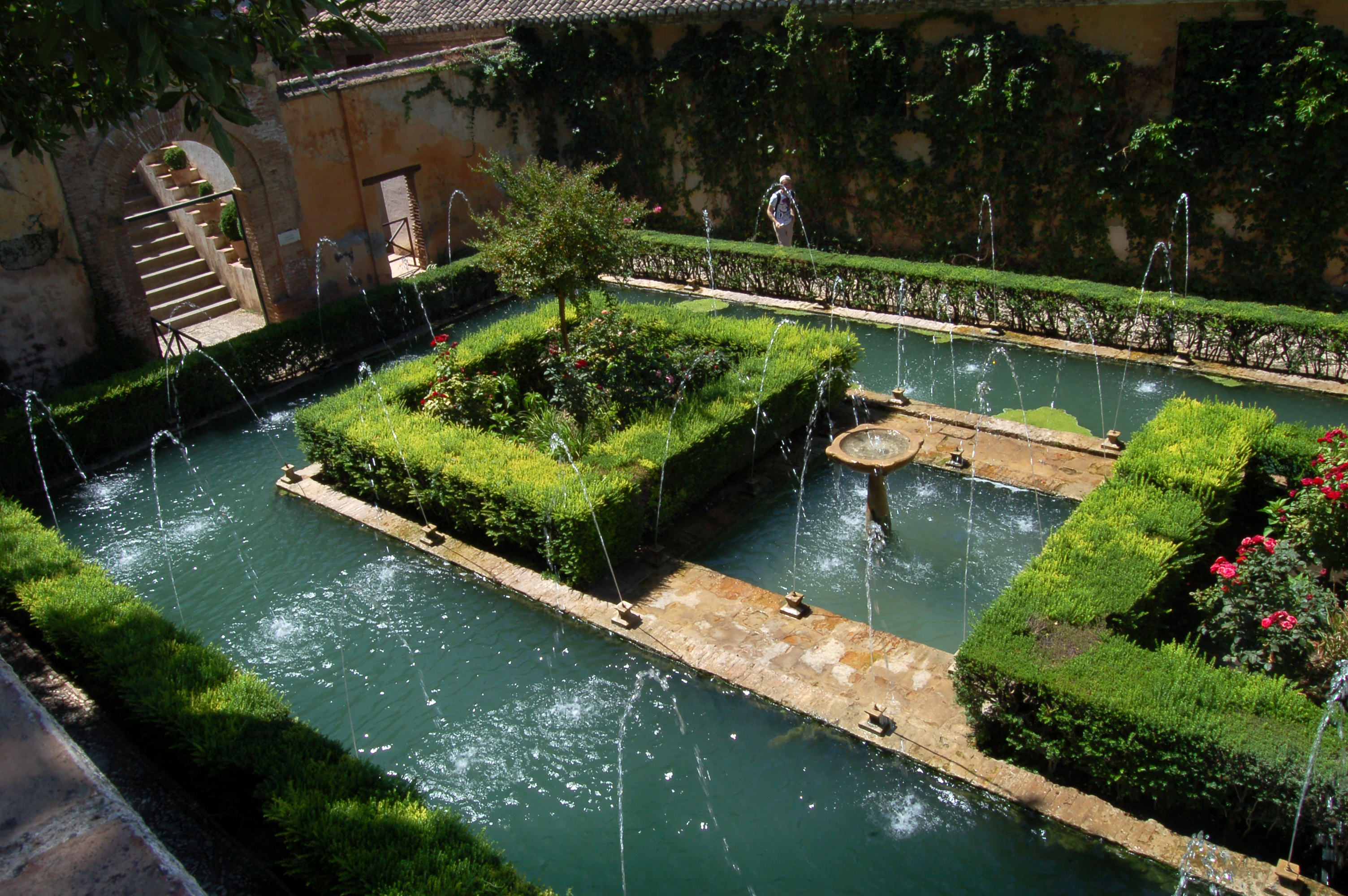 Jardín Alhambra